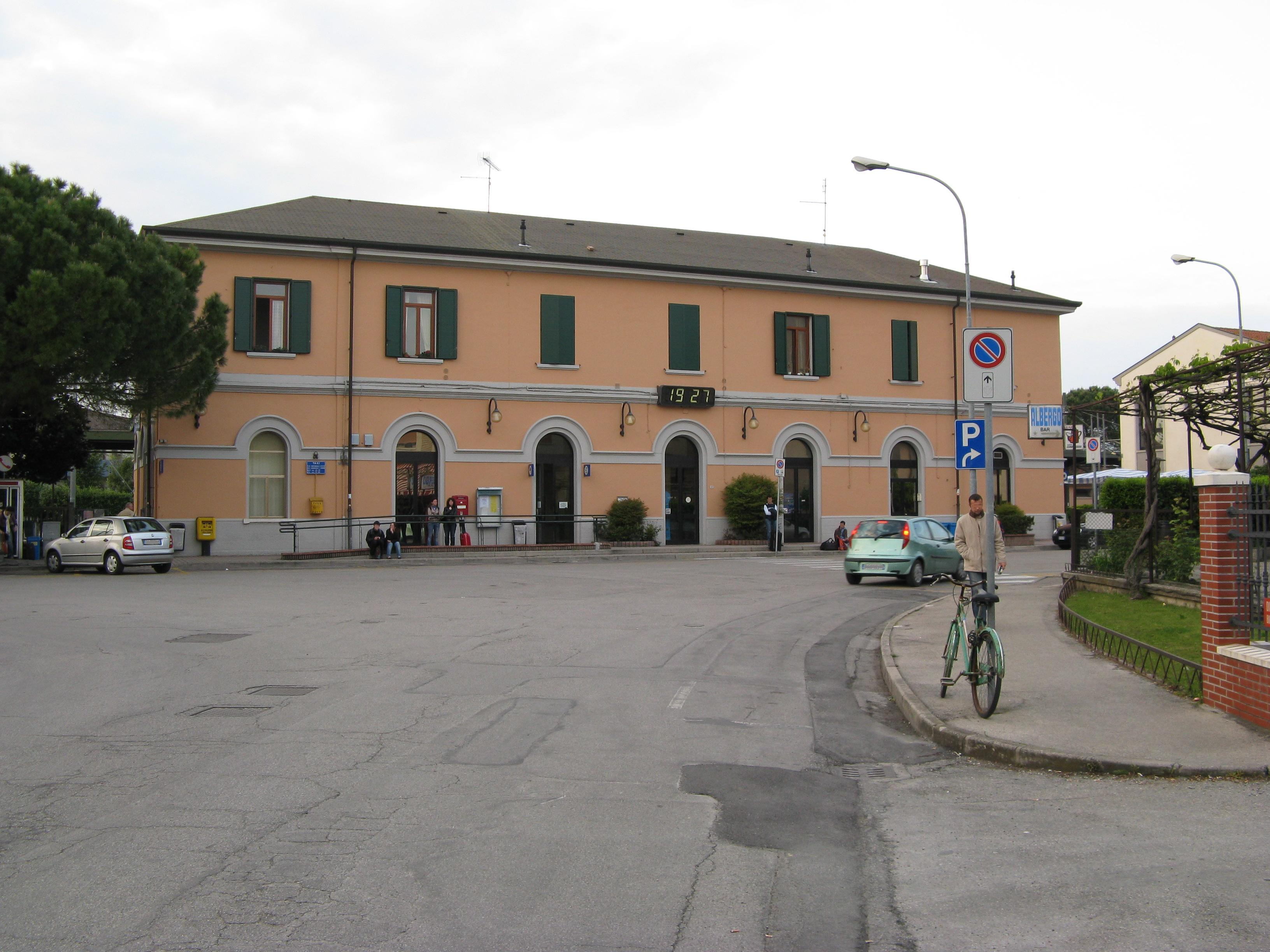 Piazzale e facciata della stazione FS di San Donà di Piave-Jesolo